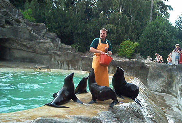 Robbenfütterung im Tierpark Hagenbeck